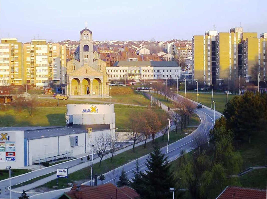 Srpskohrvatski / српскохрватски: Uz ulicu Samjuela Beketa (eks Blaža Jovanovića) u Mirijevu, nalaze se neki važni objekti. Na uglu sa ul. Mirijevski venac je supermarket. Iznad se nalazi crkva (u izgradnji). Dalje i iznad je Dom zdravlja (duga, bela, dvospratna zgrada; u izgradnji). Preko puta (levo) od Doma zdravlja je Mirijevska pijaca (ne vidi se), oko koje se nalaze mnogi lokali. Još dalje u naselju je i Stanica Policije. Višespratnice između crkve i Doma zdravlja su karakteristične za Mirijevo II, a zgrade sa crvenim krovovima iza Doma su deo Mirijeva IV. Snimljeno 9.3.2008.